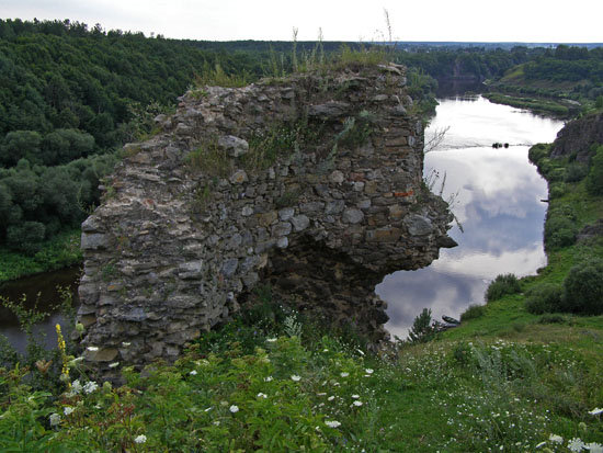 Губківський замок 1.jpg: Губківський замок